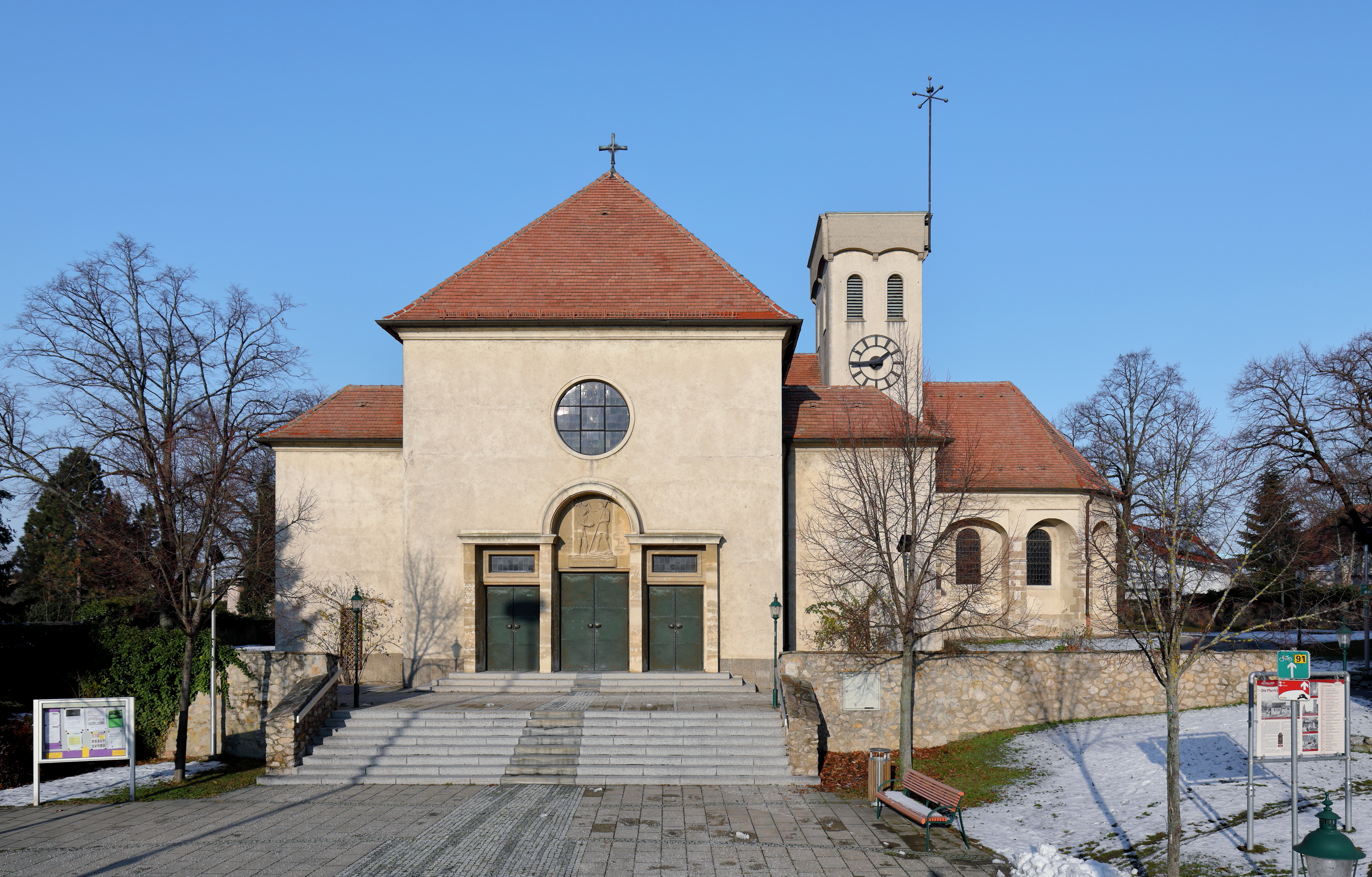 Die röm.-kath. Pfarrkirche hl. Johannes der Täufer in der niederösterreichischen Stadt Deutsch-Wagram.Ab Mai 1956 wurde linksseitig des romanischen Chorquadratturmes die alte Pfarrkirche bzw. dessen Langhaus abgerissen und rechtwinkelig dazu die neue Pfarrkirche nach einem Entwurf des Architekten Hans Petermair angebaut und am 21. Juni 1958 geweiht. Das Relief über dem dreiteiligen Hauptportal stellt den hl. Johannes der Täufer dar und ist ein Werk des Bildhauers Rudolf Schmidt.